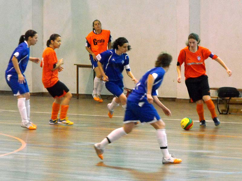 Jogo de futsal feminino entre o Académico Alves Roçadas (equipamento azul) e o Soutelense Futebol Clube (equipamento laranja). Imagem do Desportivo Transmontano (notícia aqui).